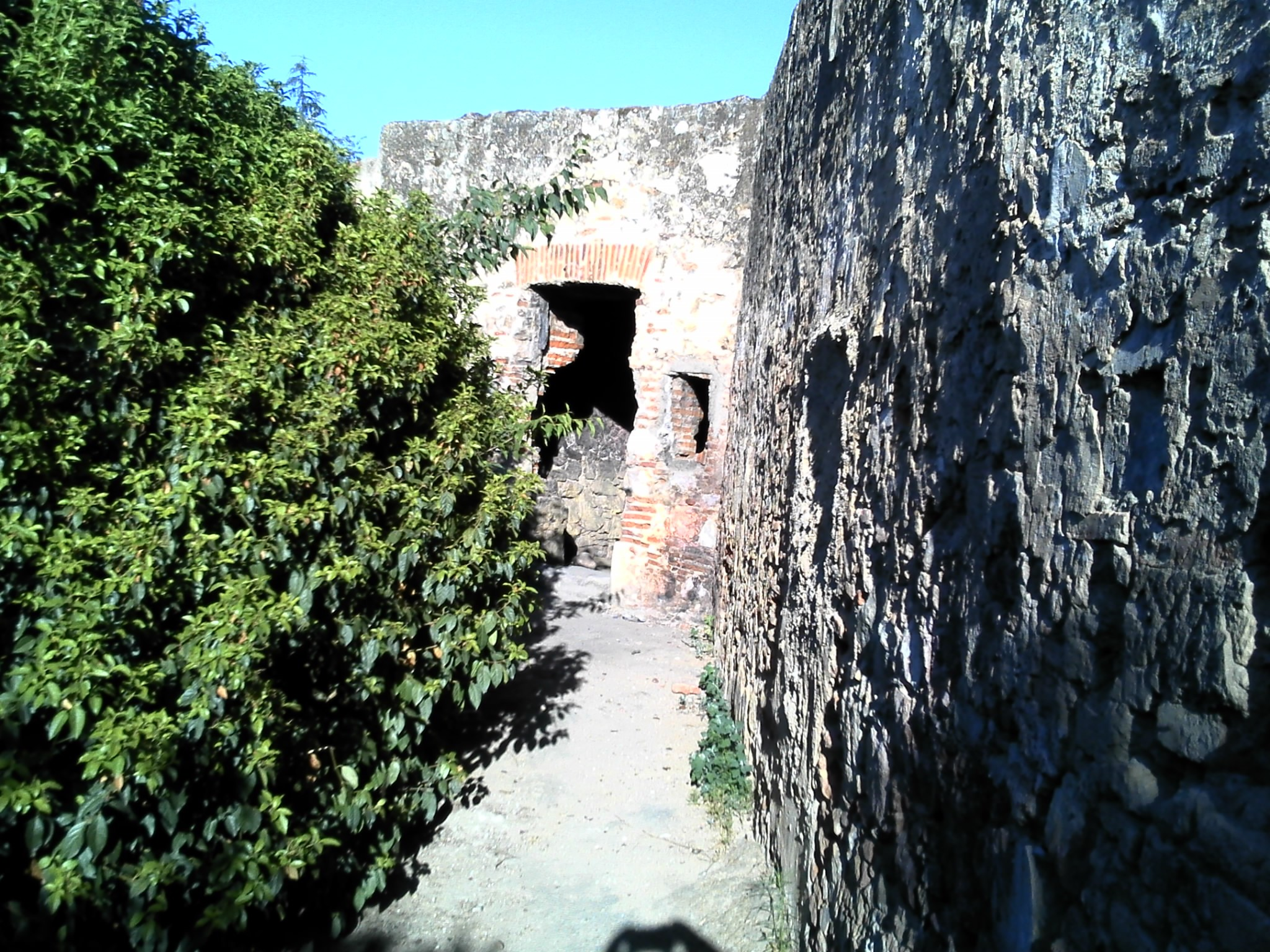 Ruinas Fuerte de Pardaleras